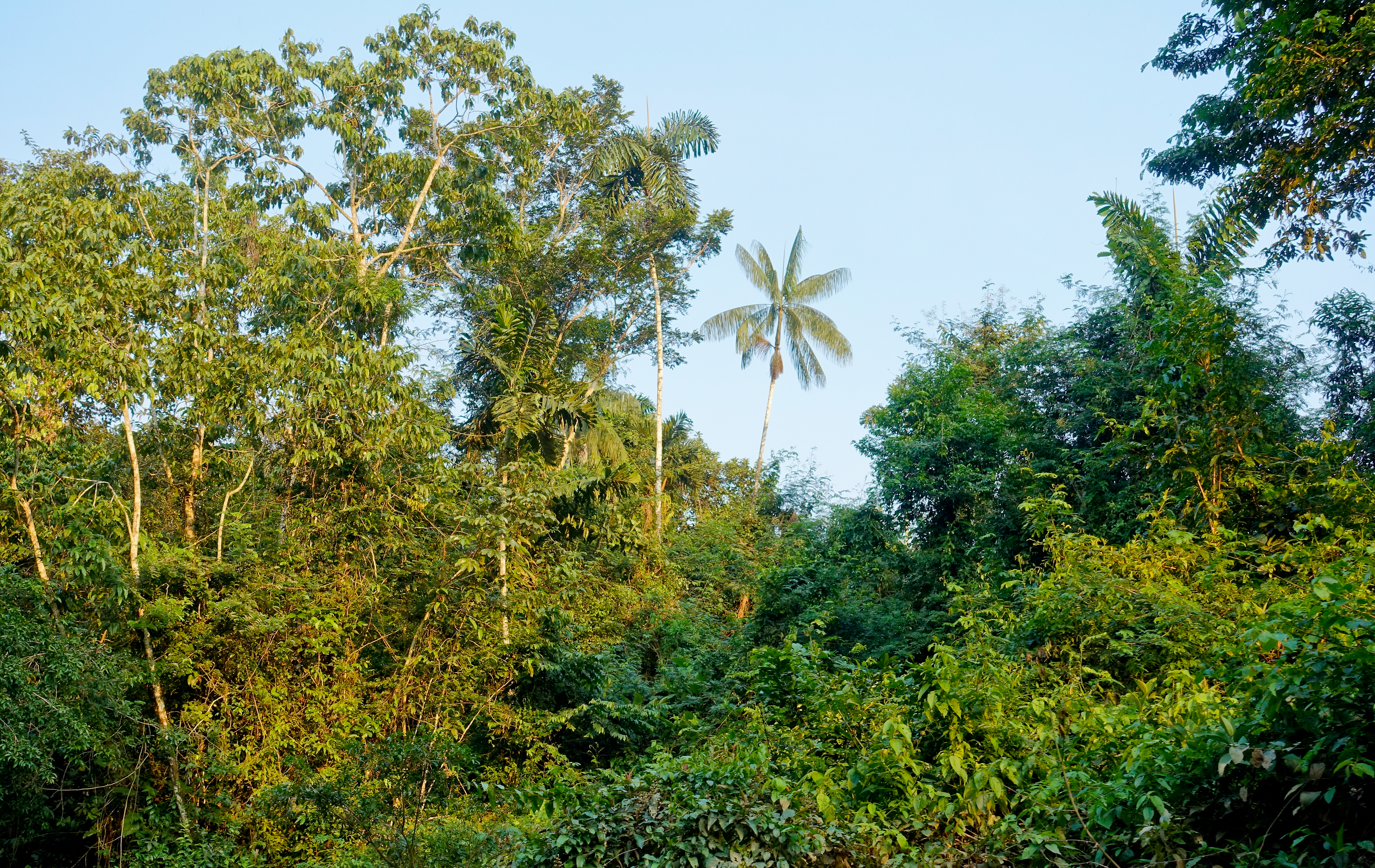 Tropischer Regenwald im Wildtier-Reservat Cuyabeno, Ecuador